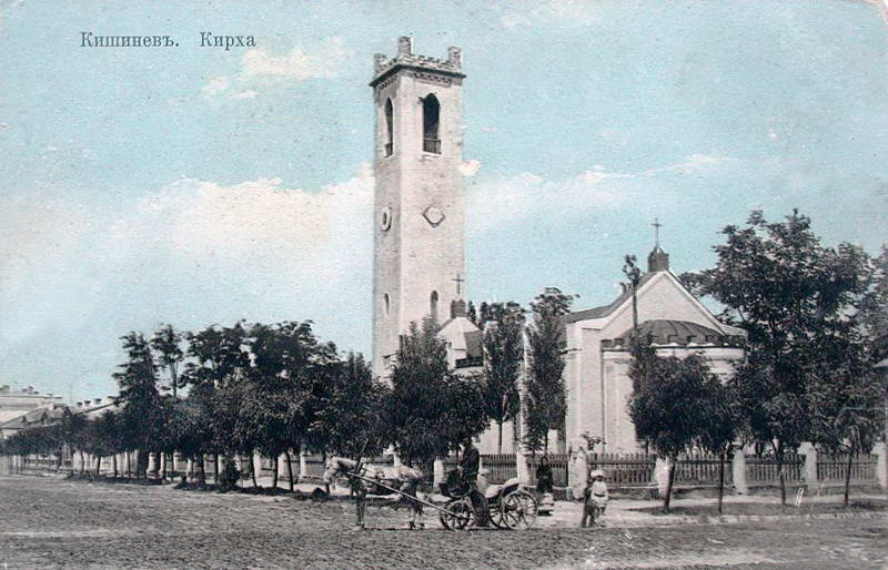 Лютеранская кирха в Кишинёве, построенная в 1834-36 гг.